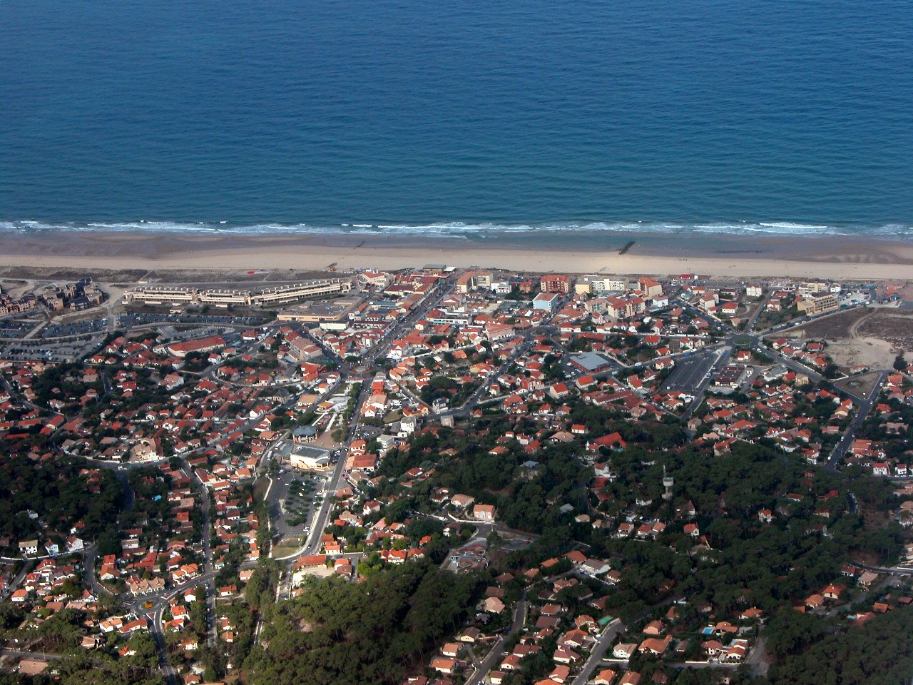 vue aérienne de Lacanau, été 2005